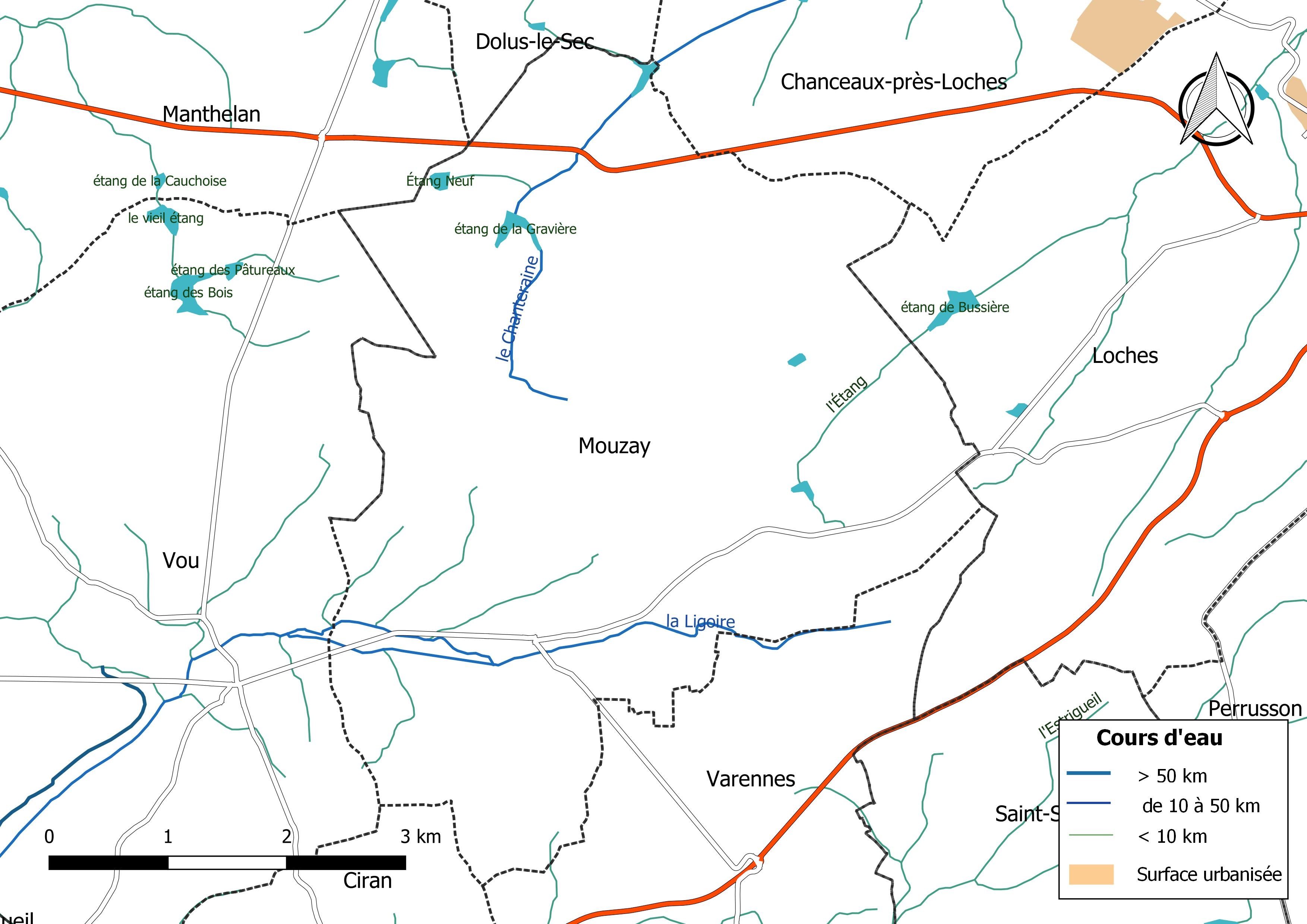 Carte du réseau hydrographique de la commune de Mouzay (Indre-et-Loire) (France).